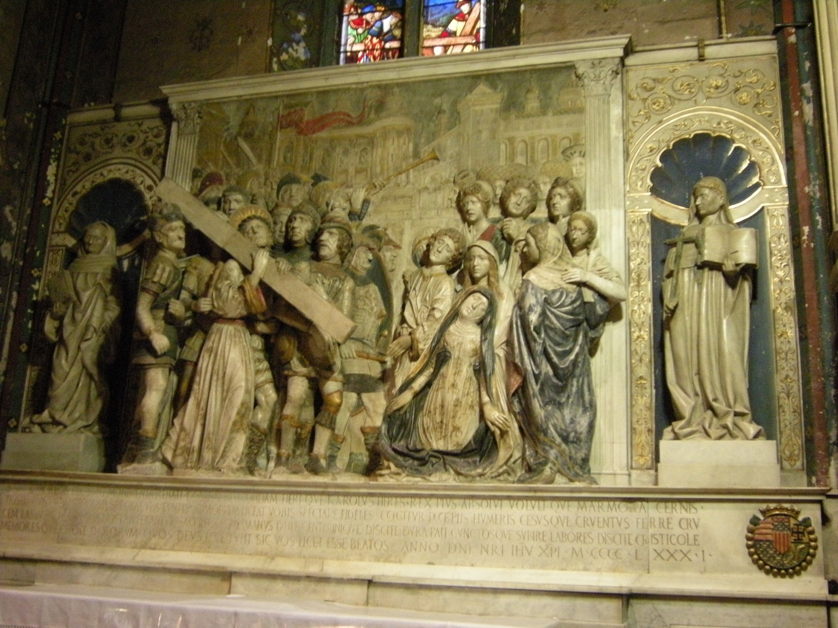 retable